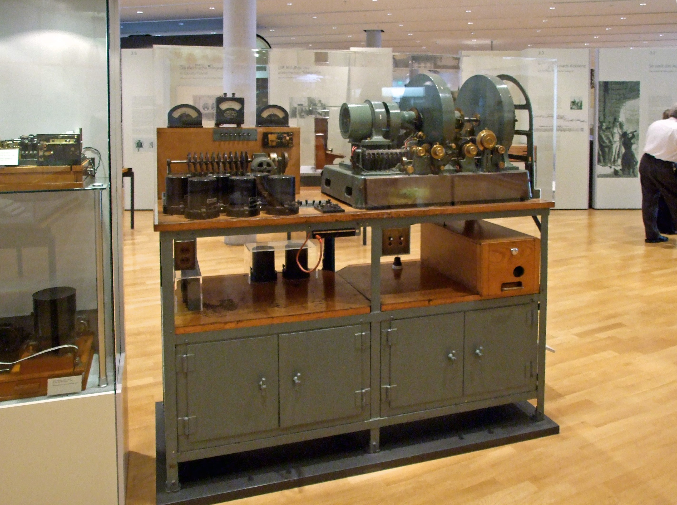 Verteiler fuer das Azorenkabel der Deutsch-Atlantischen-Telegraphengesellschaft (DAT) von 1944, im Museum fuer Kommunikation in Frankfurt/Main